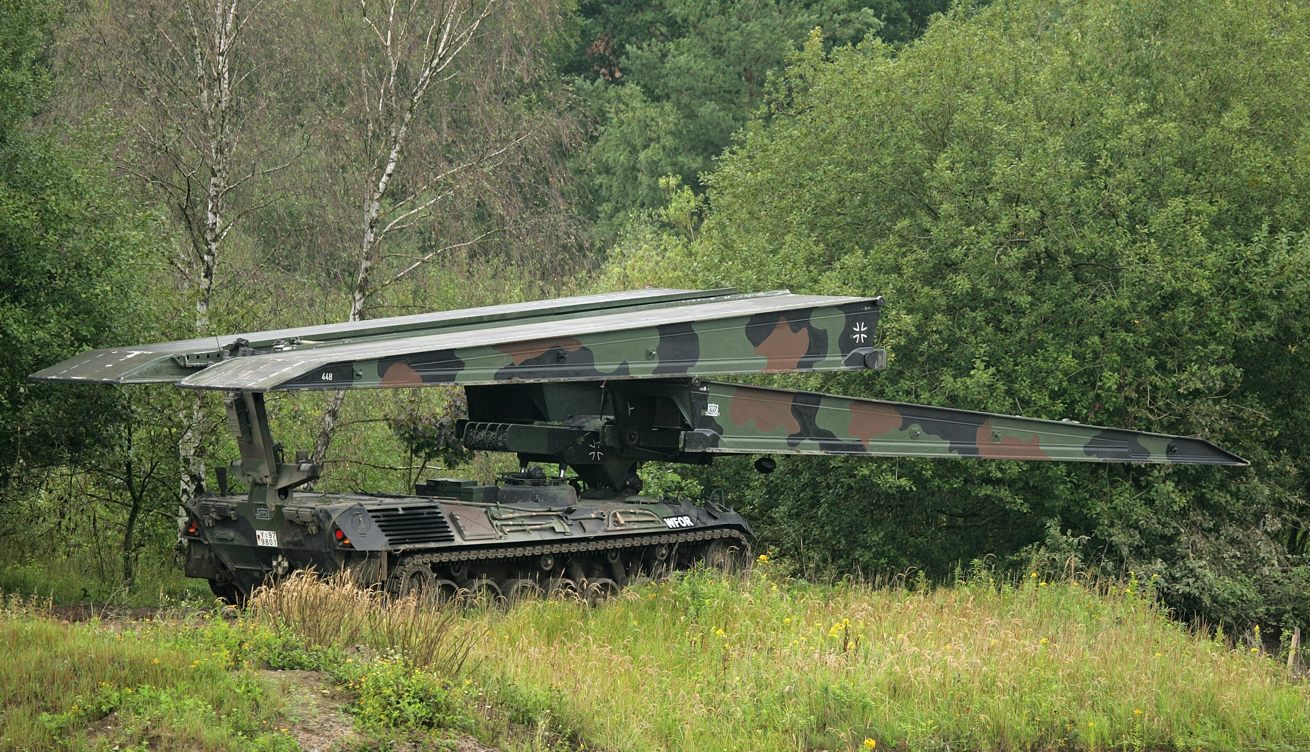 Panzerschnellbrücke Biber. Vorüben der Informationslehrübung Heer. Die Panzerlehrbrigade 9 stellt vom 4. bis 10. September die Fähigkeiten des deutschen Heeres auf dem Truppenübungsplätzen Munster und Bergen vor. Unterstützt wird die Lehrbrigade dabei vom Ausbildungszentrum Munster. In diesem Jahr wird das heutige und zukünftige Aufgabenspektrum des deutschen Heeres in dieser Lehrübung dargestellt. Die Informationslehrübung richtet sich in erster Linie an den Führernachwuchs der Bundeswehr, der Offizierschule des Heeres und Soldaten ausländischer Streitkräfte. ©Bundeswehr/Mandt